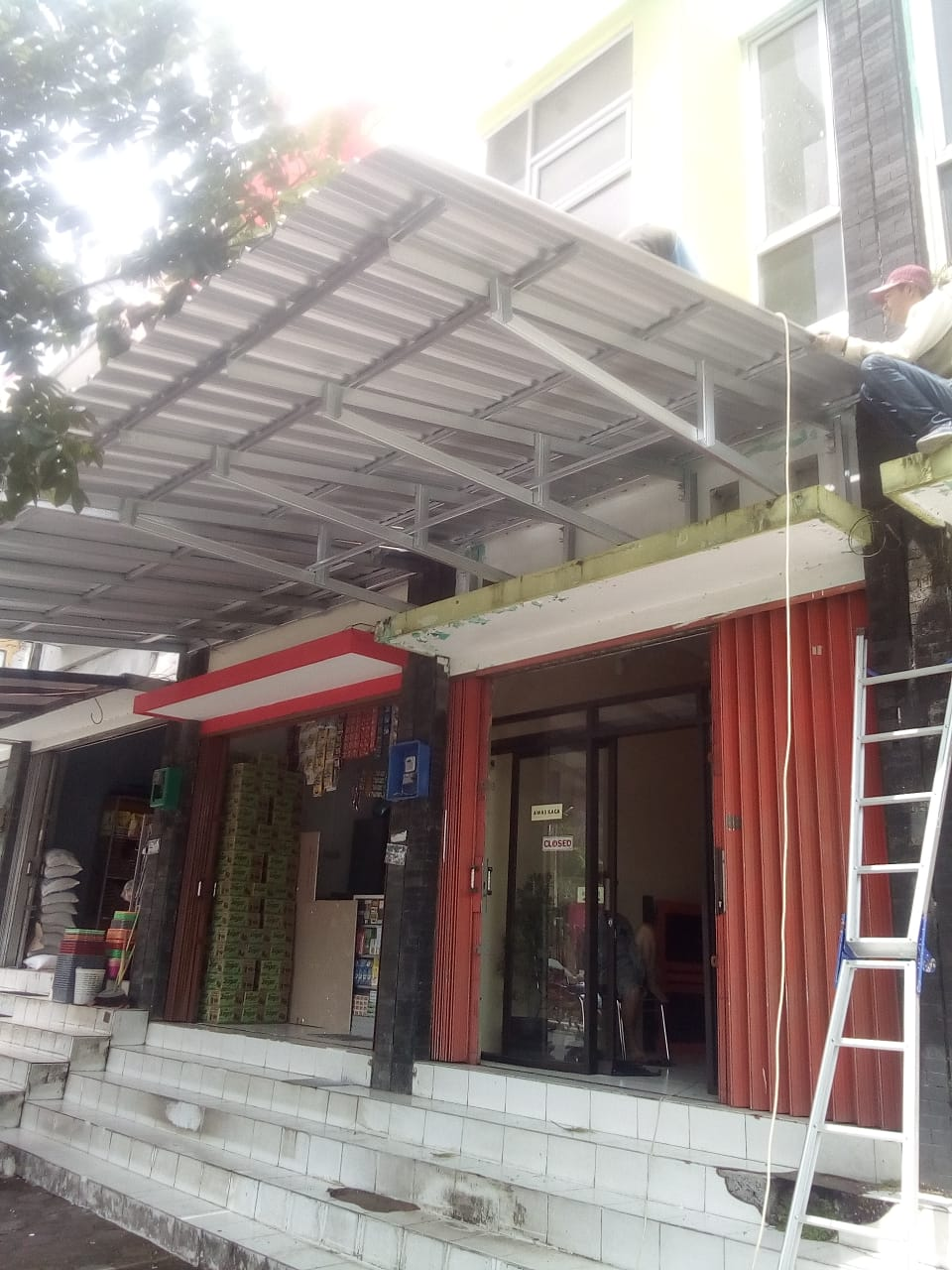 Contoh Gambar Kanopi Baja Ringan yang dipasang di teras sebuah ruko (rumah-toko)